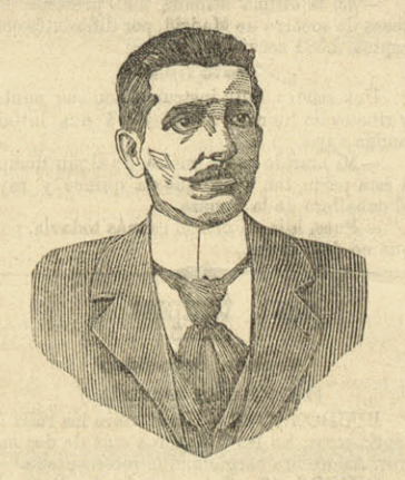 Mariano Jamardo